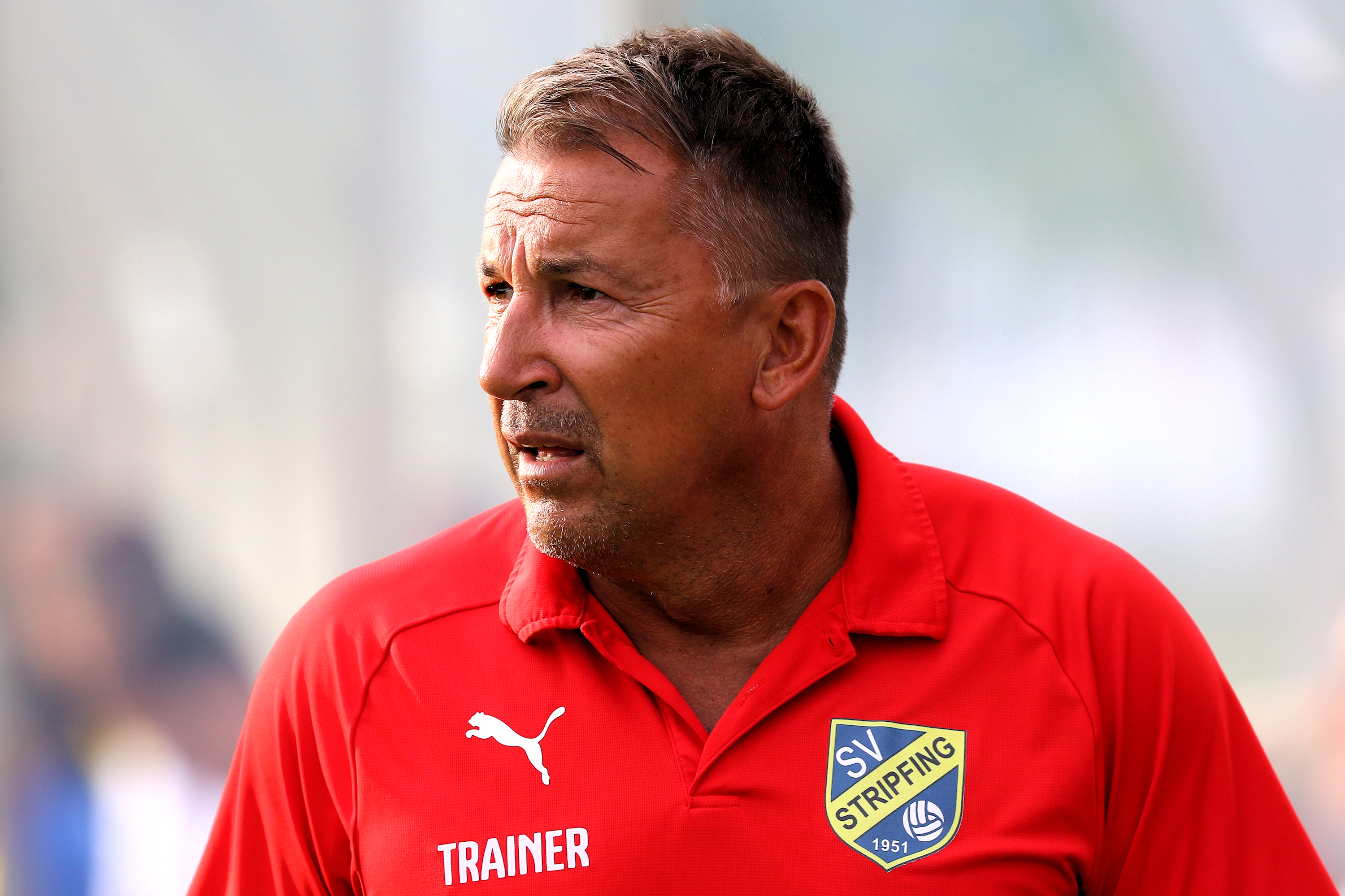 Meisterschaftsspiel der Regionalliga Ost 2019/20 SC Wiener Neustdat (weiße Trikots) gegen SV Stripfing (gelbe Trikots) am 17. August 2019 1:1 (1:0). – Das Bild zeigt Erwin Cseh (Trainer des SV Stripfing).